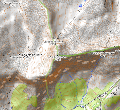 carte réalisée sur umap This map may be incomplete, and may contain errors. Don't rely solely on it for navigation.